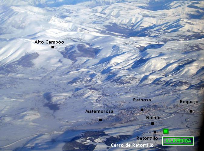 Imagen área del extremo noroeste de Campóo. Se observan las principales localidades de la zona así como el cerro de Retortillo, donde se halla Julióbriga.